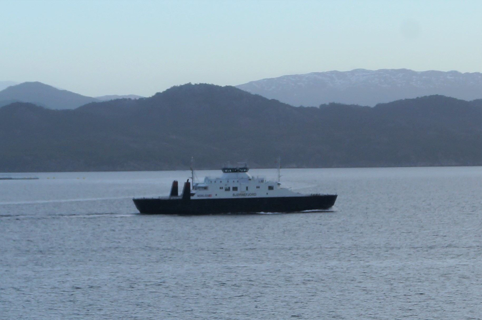 «Bjørnefjord» i Korsfjorden